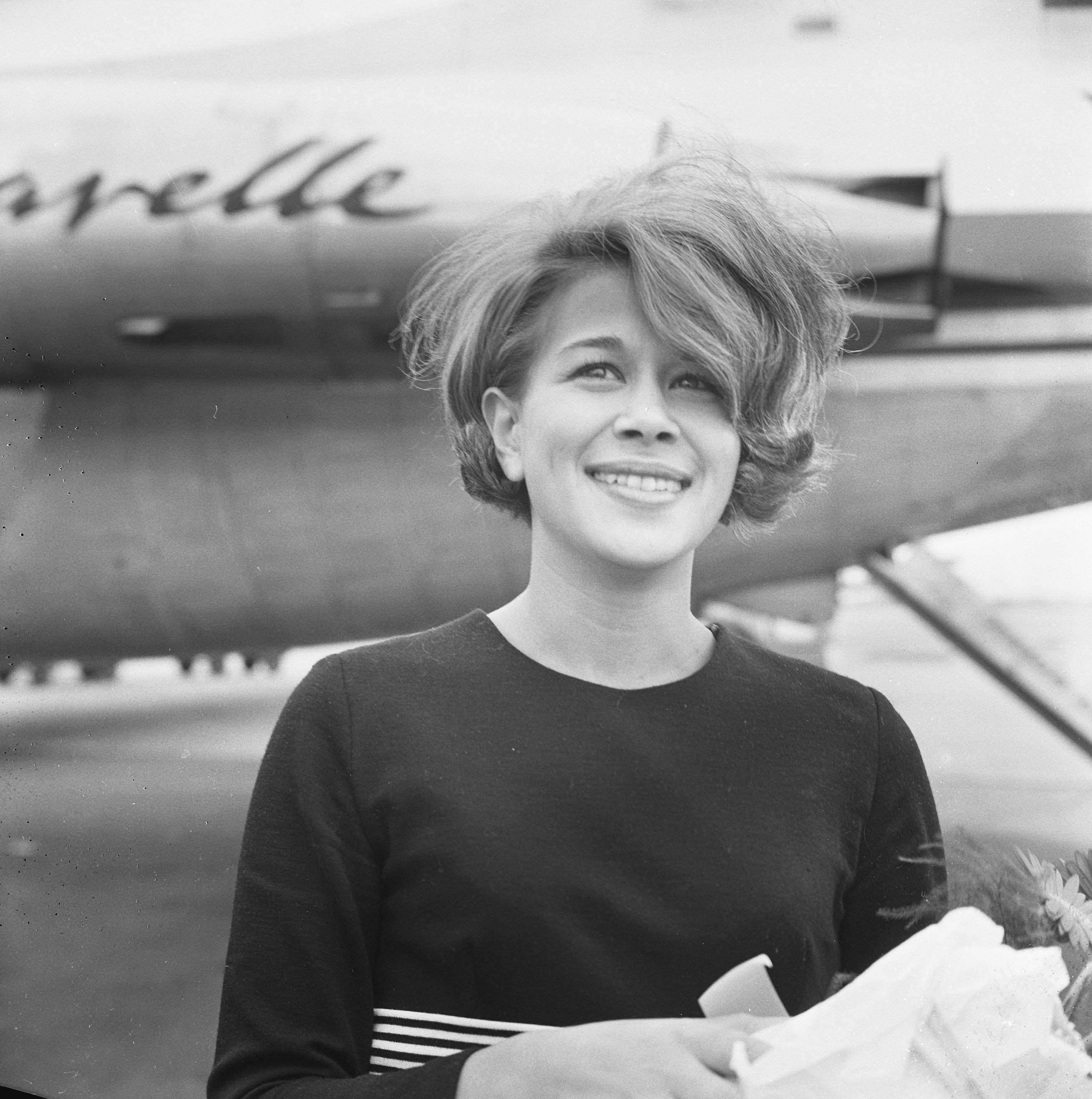 Collectie / Archief : Fotocollectie Anefo Reportage / Serie : Anneke Grönloh met zoontje Stephan tonen in de perskamer van Schiphol de ontvangen zilveren plaat Beschrijving : zangeressen, portretten, vliegtuigen, Grönloh, Anneke Datum : 22 september 1966 Locatie : Noord-Holland, Schiphol Trefwoorden : portretten, vliegtuigen, zangeressen Persoonsnaam : Grönloh, Anneke Fotograaf : Koch, Eric / Anefo Auteursrechthebbende : Nationaal Archief Materiaalsoort : Negatief (zwart/wit) Nummer archiefinventaris : bekijk toegang 2.24.01.03 Bestanddeelnummer : 919-5903